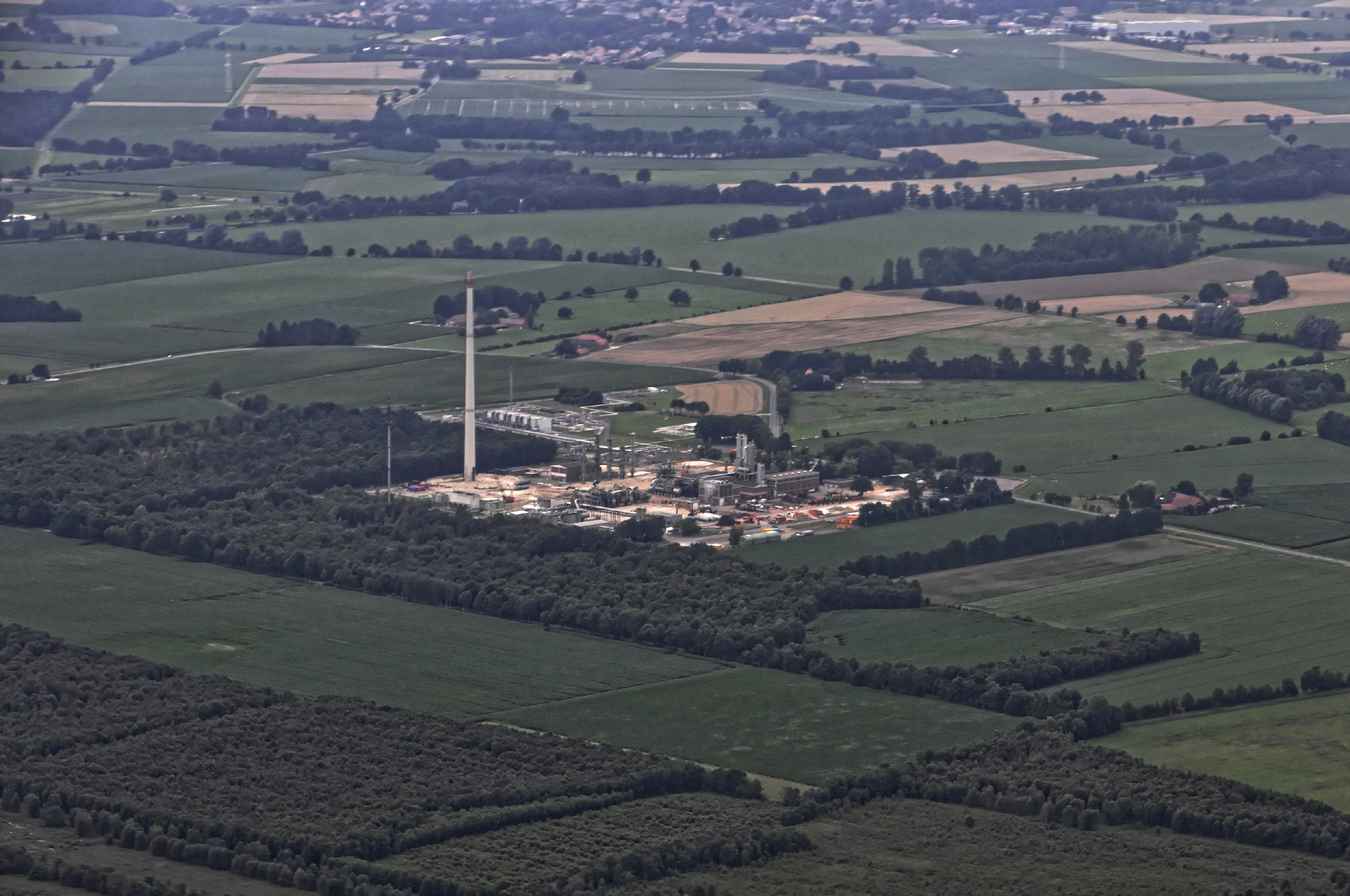 Bilder vom Flug Nordholz-Hammelburg 2015: Blick von Nordosten auf die 2013 stillgelegte ehemalige Erdgasverarbeitungsanlage im Ortsteil Voigtei von Steyerberg.